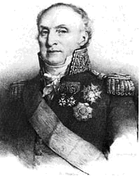 Général_Jean_Baptiste_Drouet